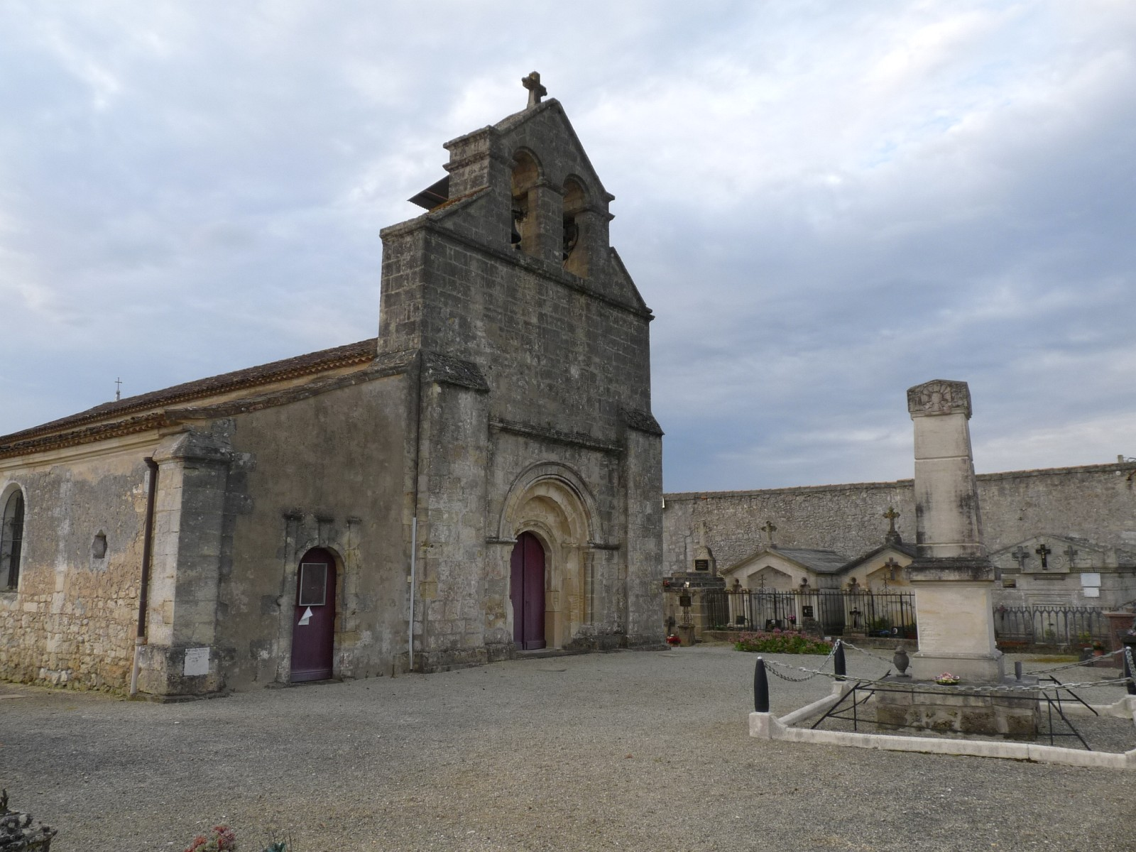 Eglise de Gauriaguet, Gironde, France